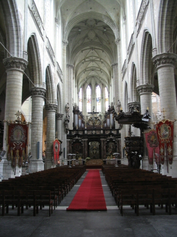 Sint-Jacobskerk (Saint James' Church) in Antwerpen, Belgium